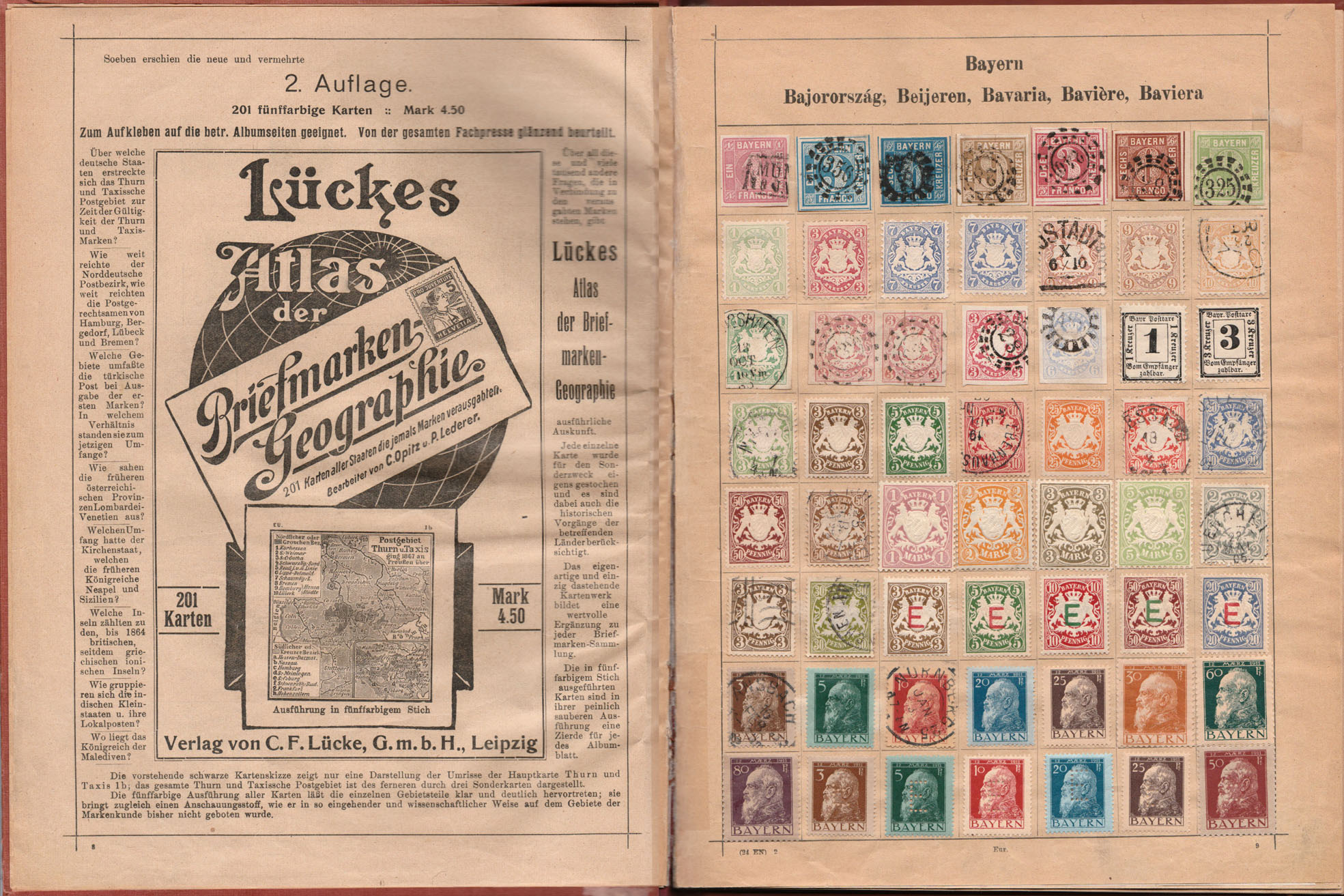 Fotographie Briefmarkenalbum Innenseiten, ca. 1920